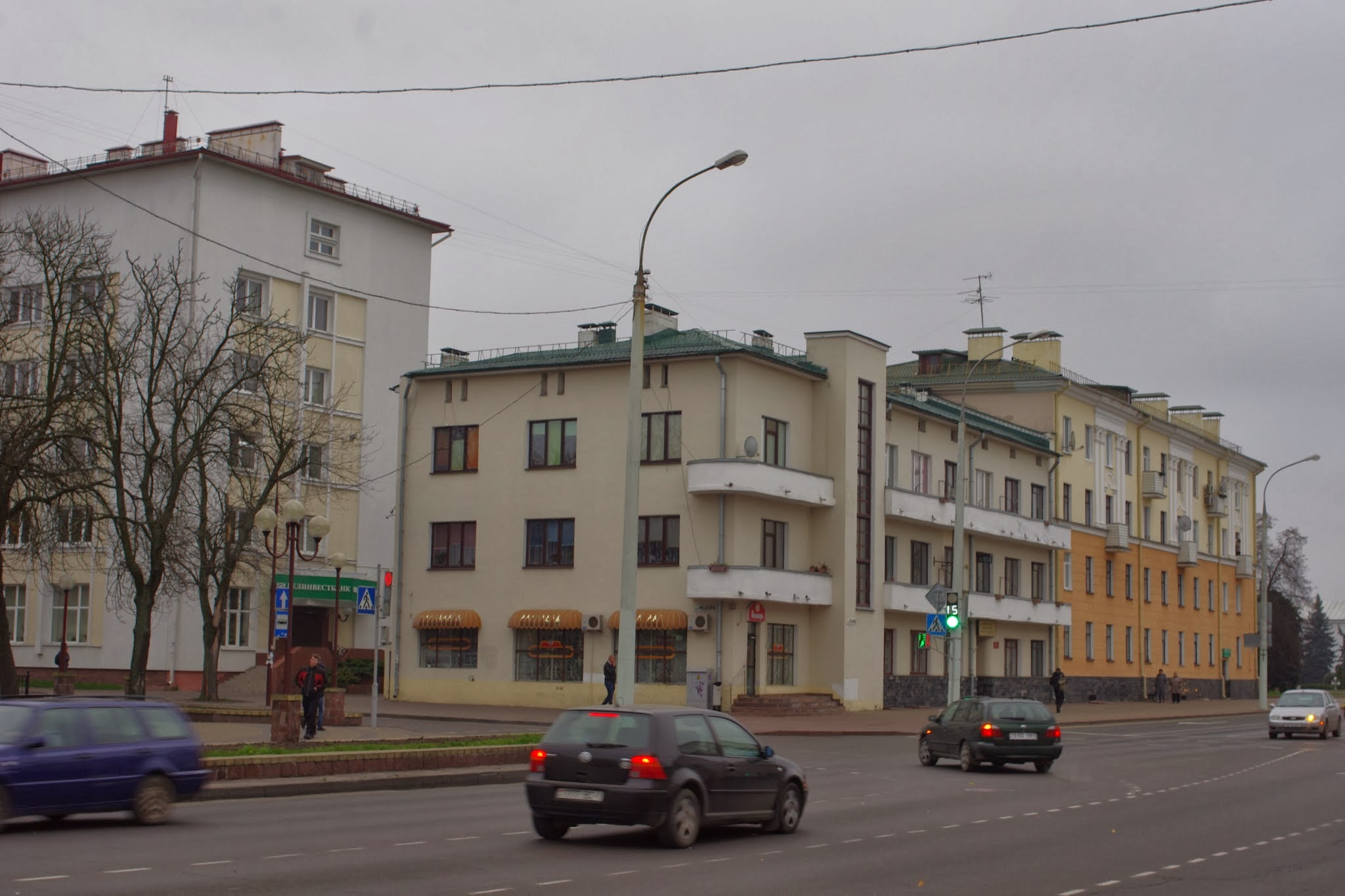 Lieninski rajon, Brest, Belarus